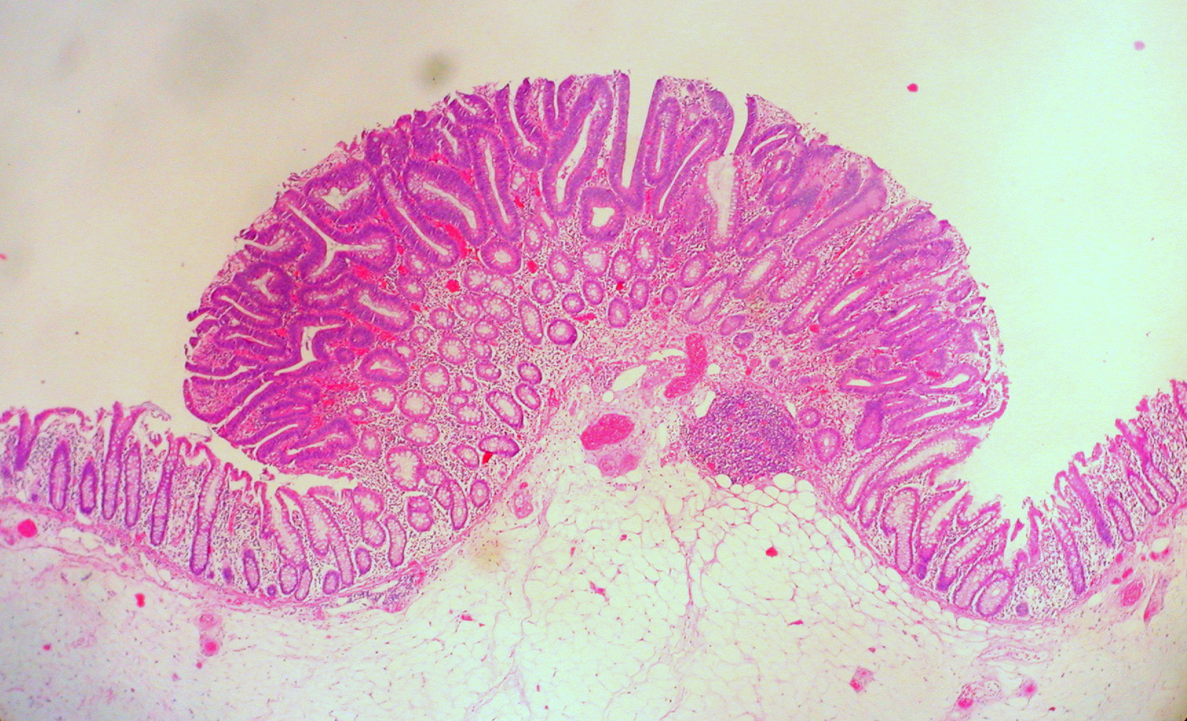 Tubular Adenoma of the Colon Incidental finding in a colectomy specimen.